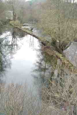 Muiño no lugar de Os Pasos, en Vilalba (Lugo). Tomada por user:Agremon. Uploaded by User:Agremon